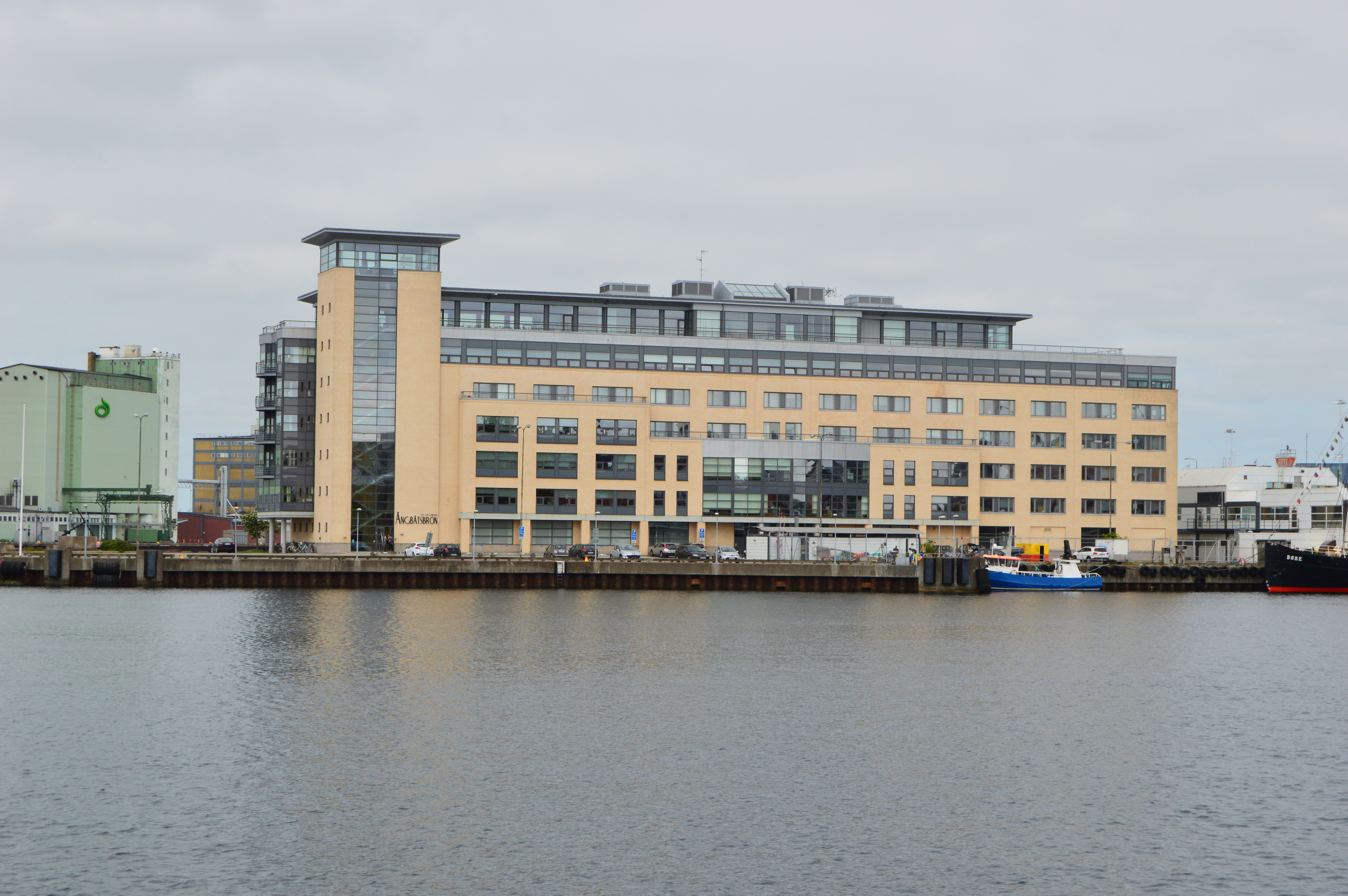 Ångbåtsbron Malmö.